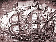 Det dansk-norske orlogsskipet «Tre Kroner». Kobberstikk